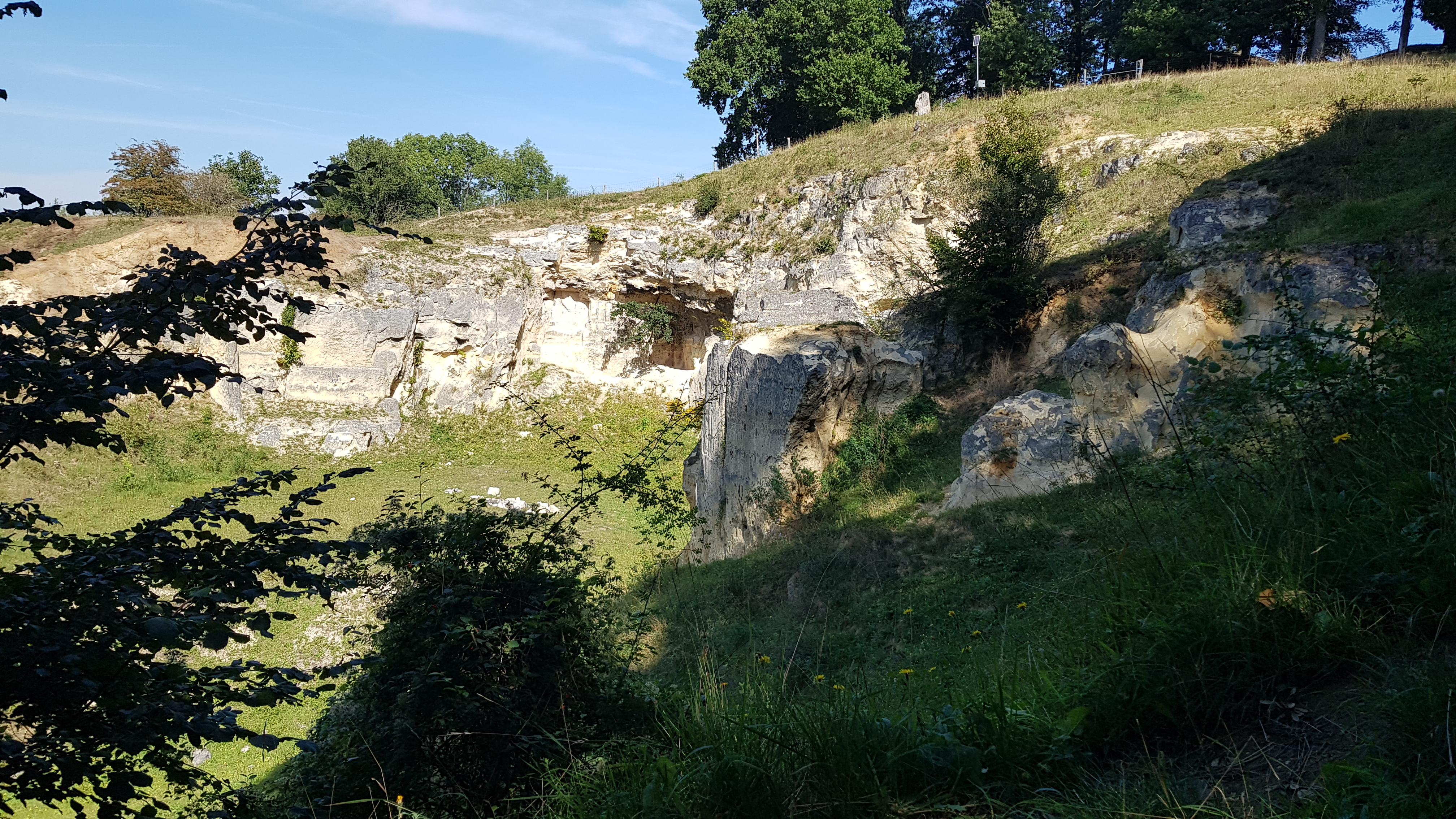 Groeve de Tombe, Maastricht, Nederland